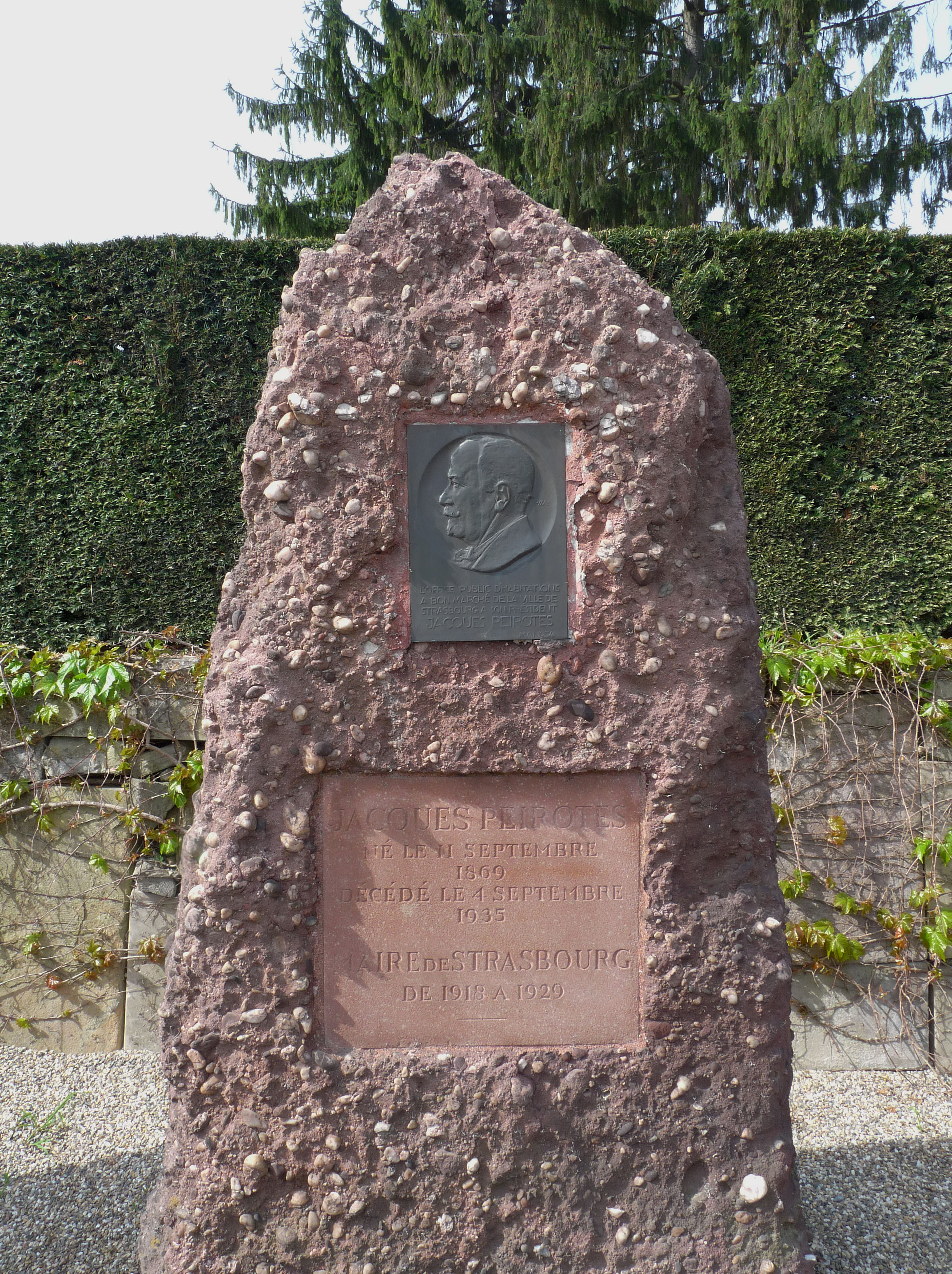 Tombe de Jacques Peirotes au cimetière Saint-Gall de Koenigshoffen (Strasbourg). Plaque d'André Marzolff.